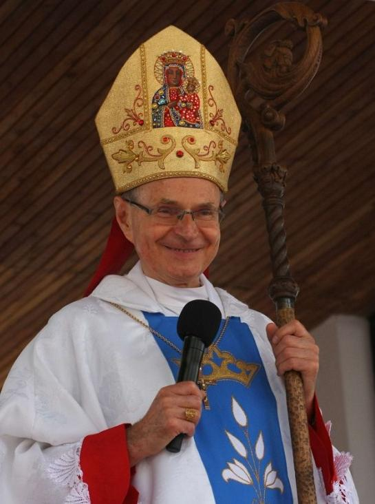 Biskup Antoni Długosz podczas spotkania Podwórkowych Kółek Różańcowych Dzieci, 7 lipca 2010